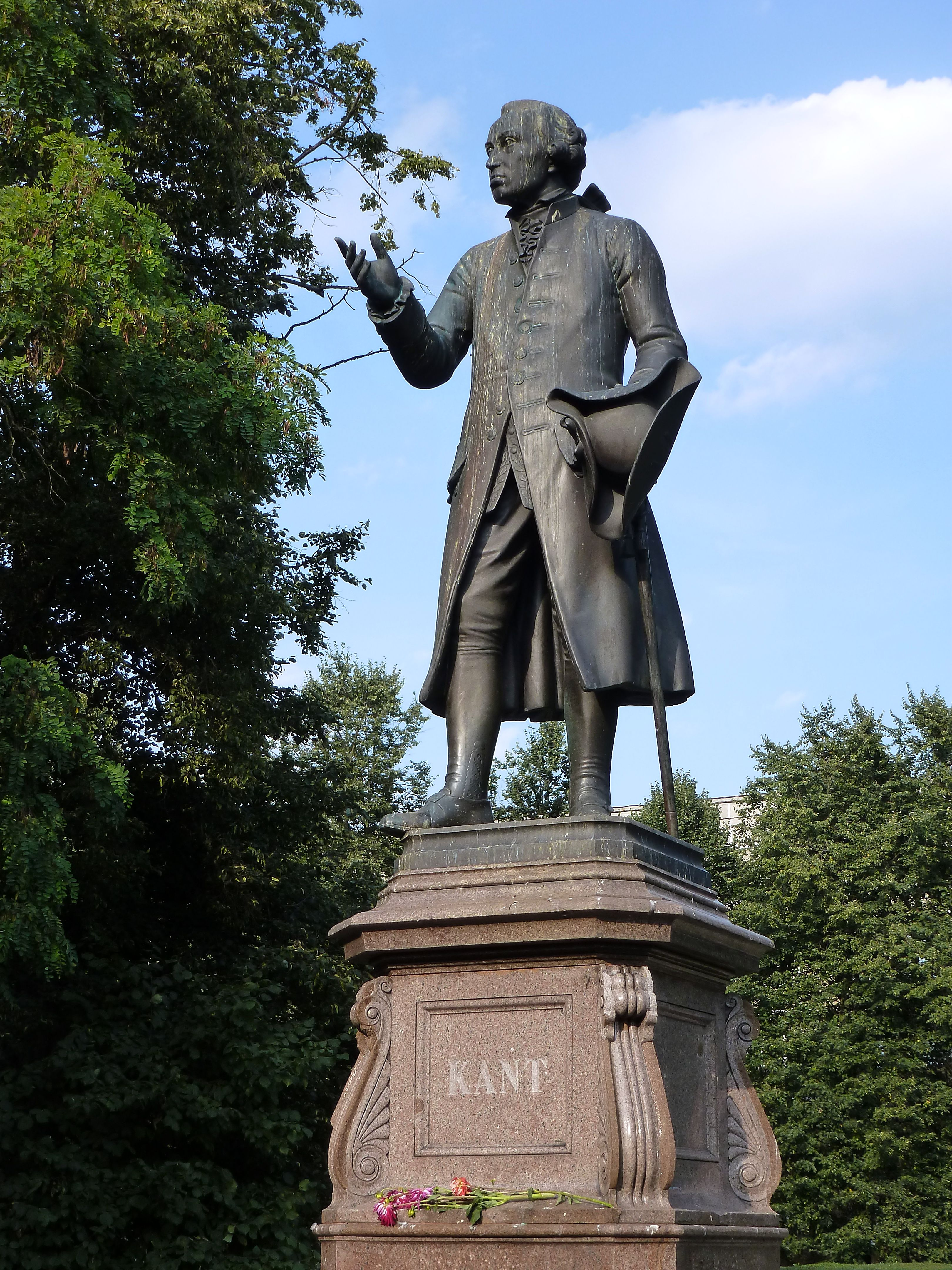 Памятник Эммануилу Канту: улица Университетская, Калининград, Калининградская область